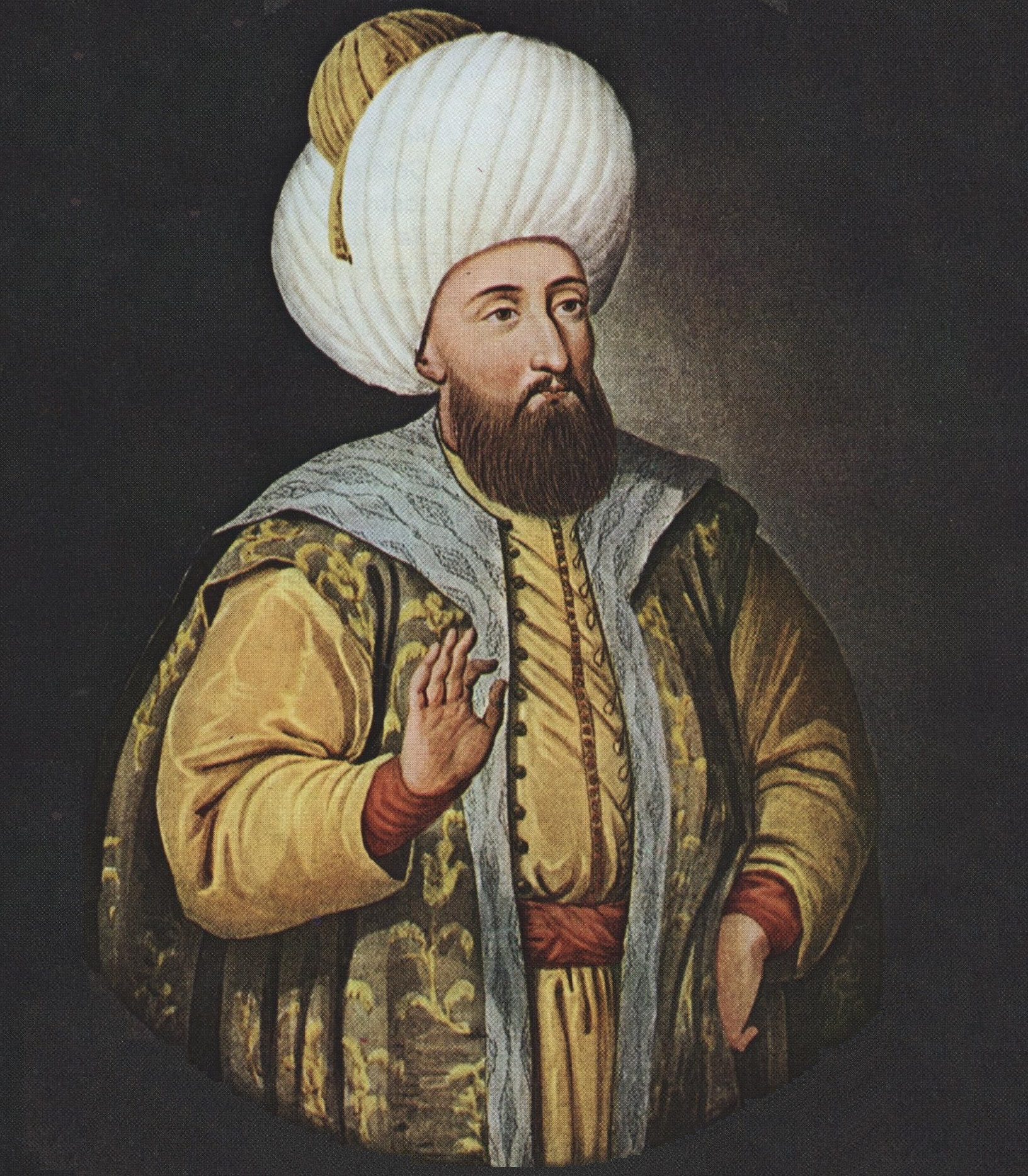 رسمٌ لِلسُلطان الغازي مُراد خان الثاني.